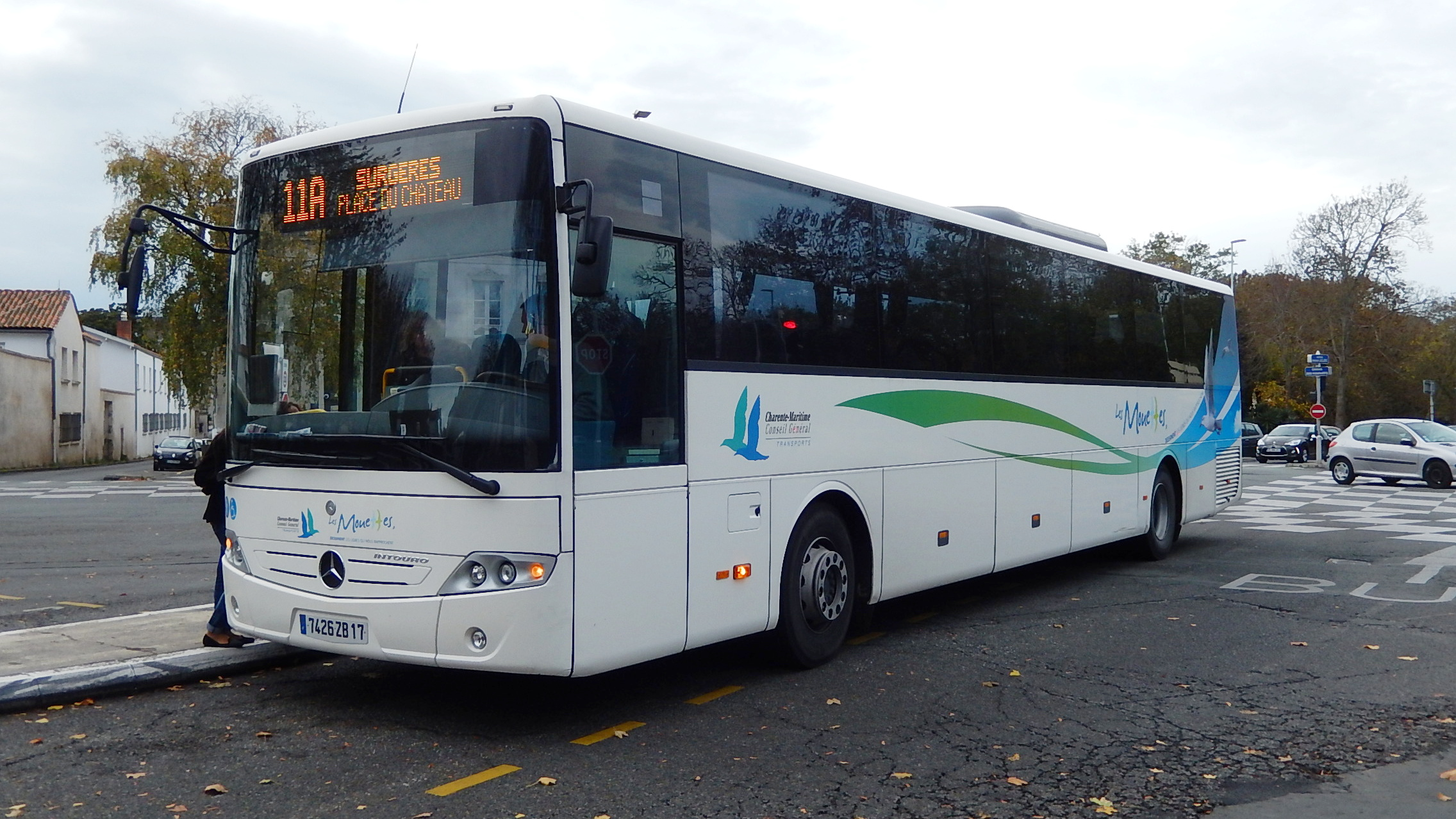 Un autocar Mercedes Intouro, photographié sur la place de Verdun à La Rochelle, au départ de la ligne 11A du réseau interurbain de Charente-Maritime « Les Mouettes », quelques instants avant qu'il ne parte en direction de Surgères.